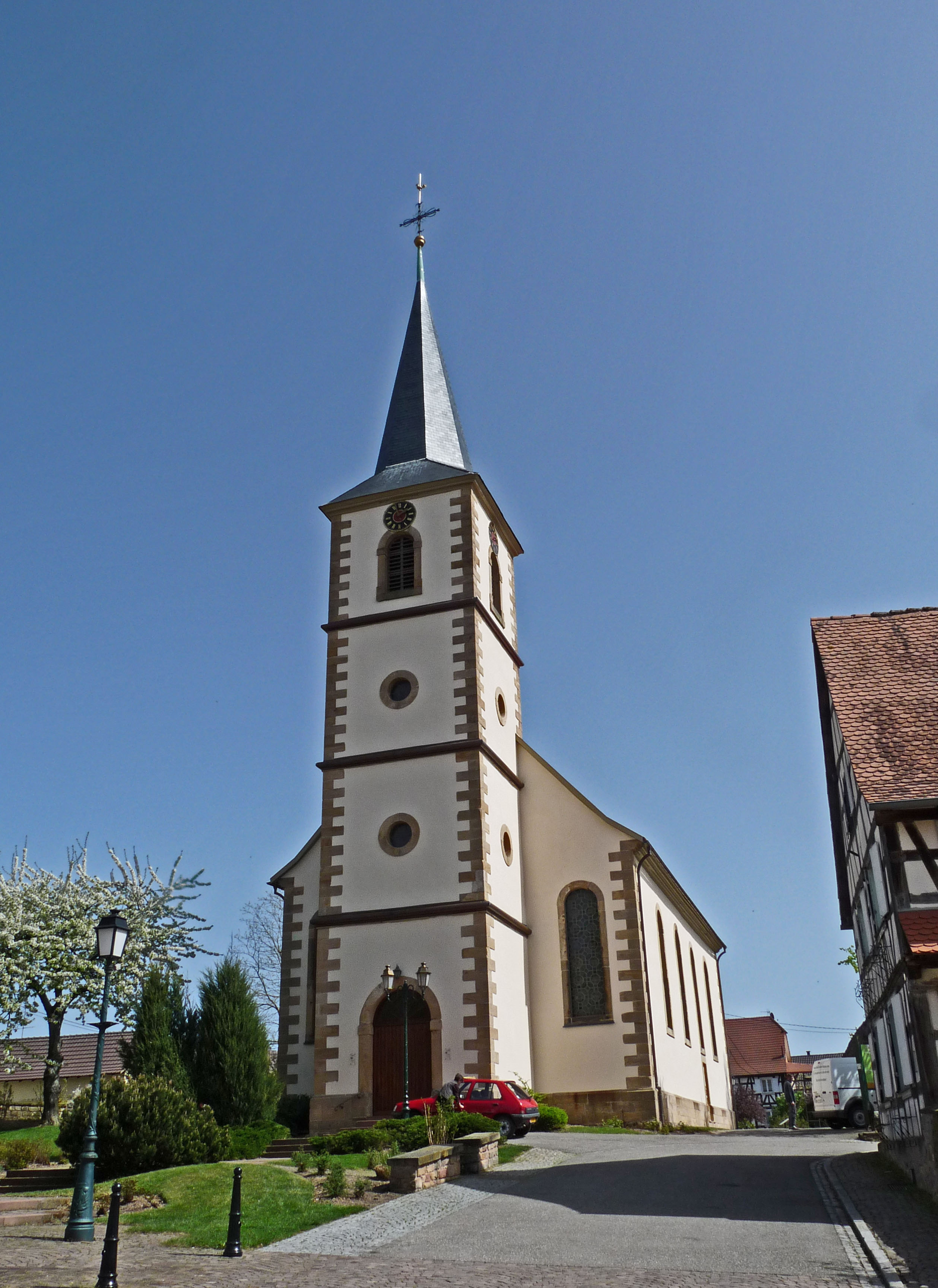 Eglise-temple (1765) de Kutzenhausen (Bas-Rhin).